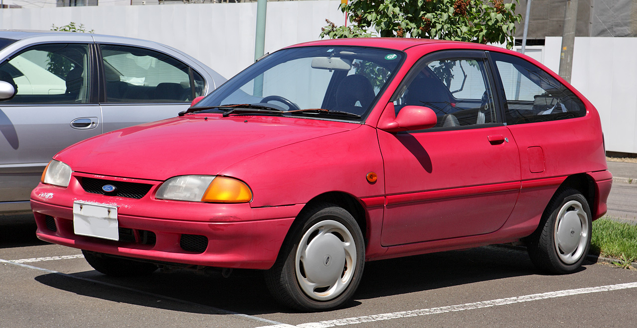 Ford Festiva 1.5 SX ( D25PF )